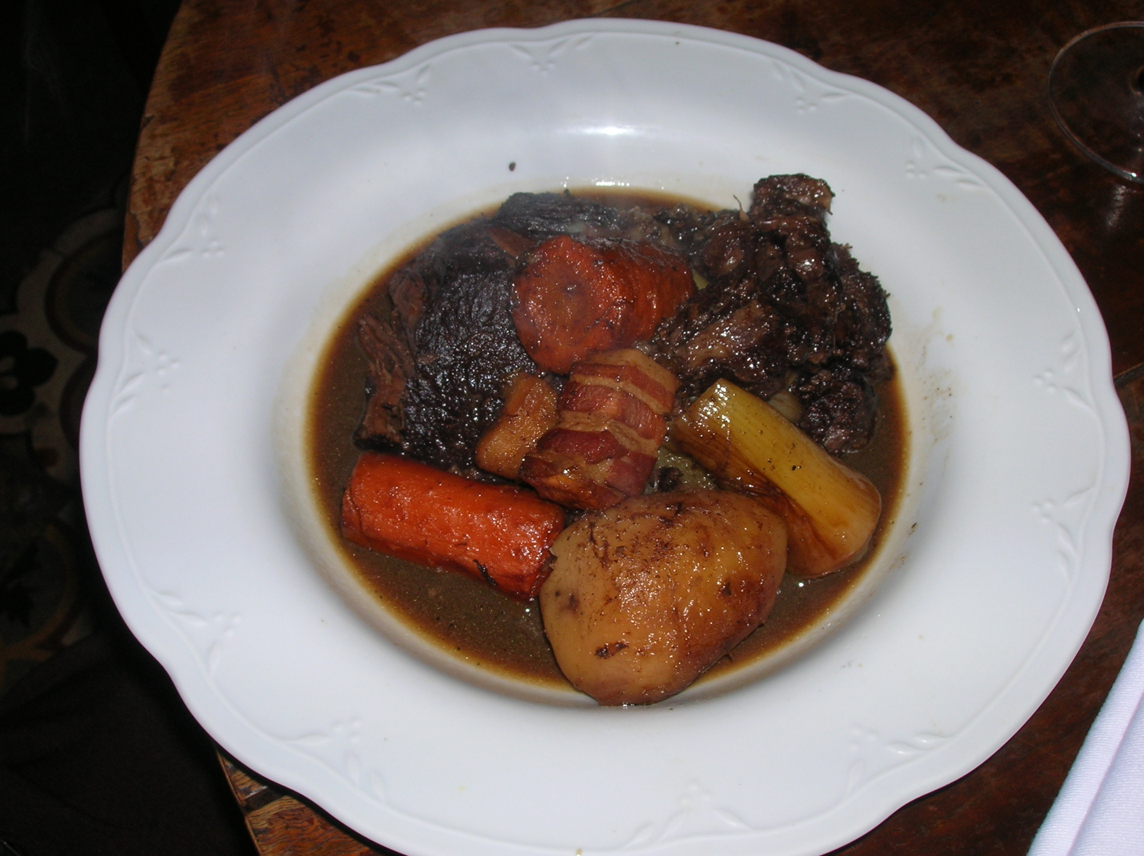 ביף בורגיניון במסעדת יועזר בר יין